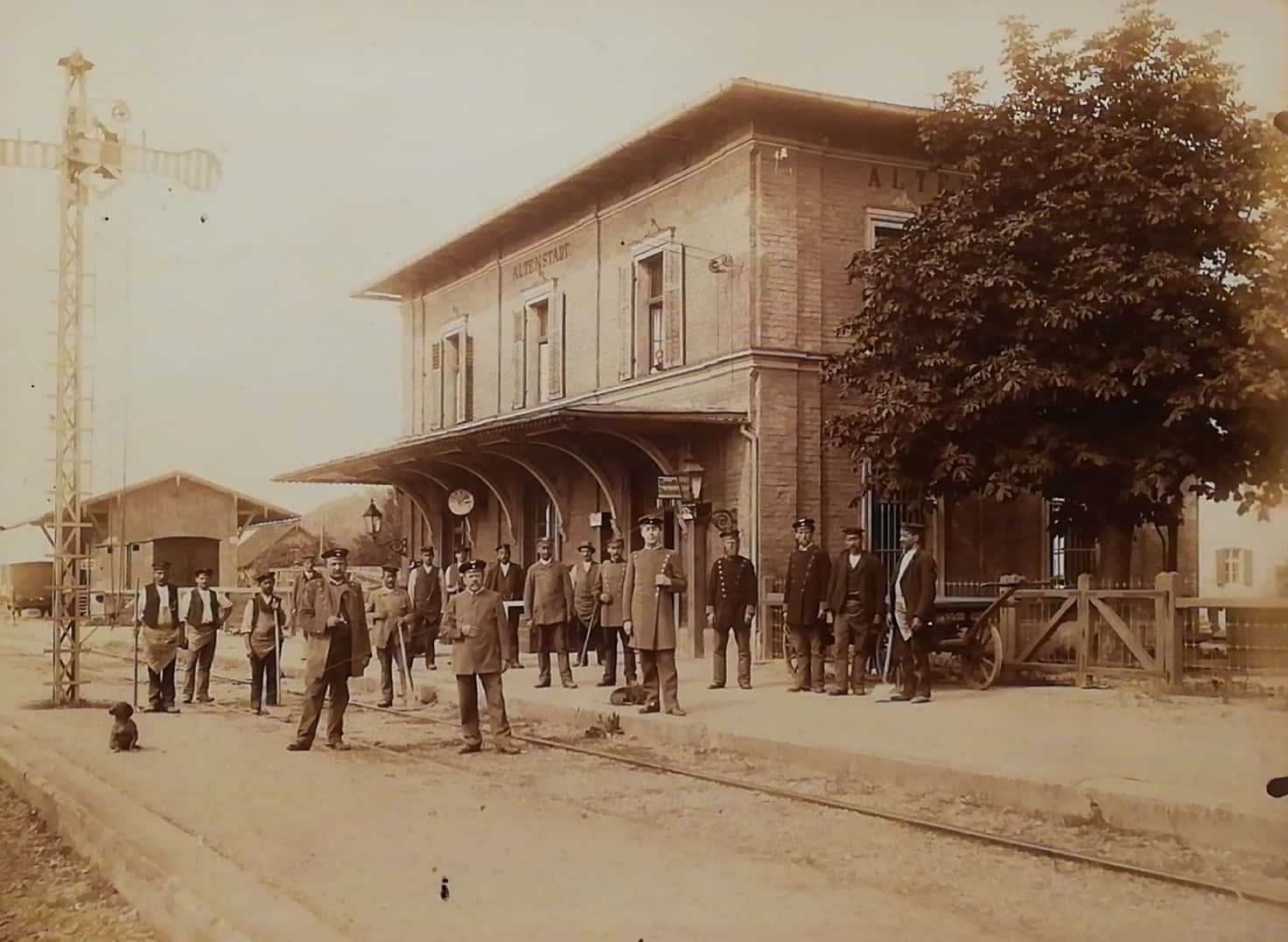 Bahnhof Altenstadt a. d. Iller Ansicht Süd-West